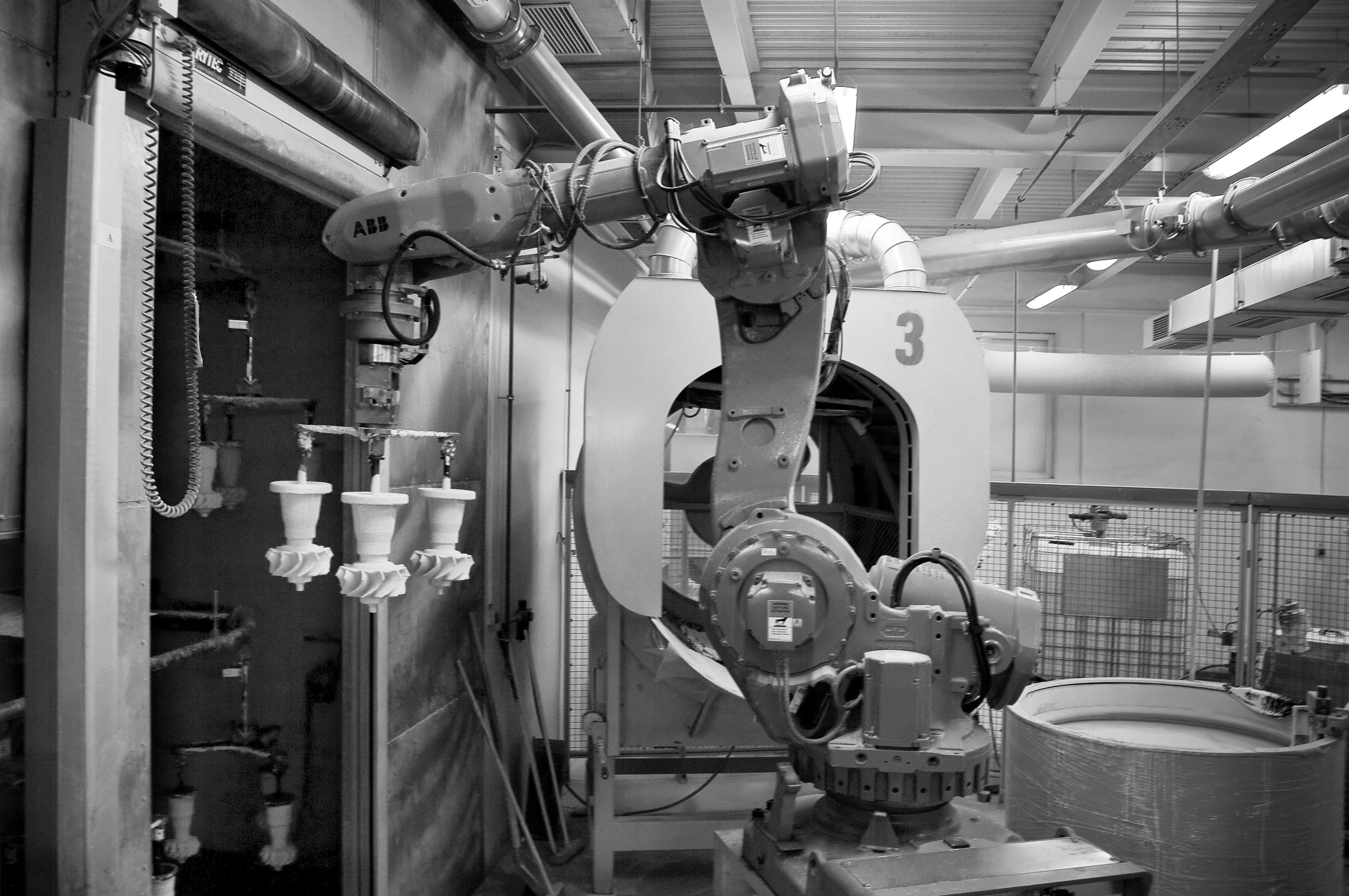 Robotická obalovací a máčecí linka